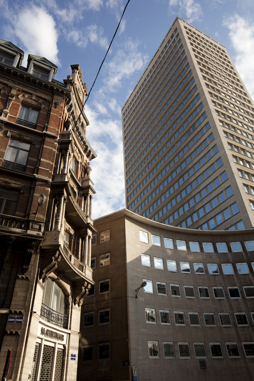 Verbreding in de Jozef Stevensstraat in Brussel, Zavelwijk, genoemd naar de socialistische voorman Emile Vandervelde. Rechts staat de Zaveltoren op de locatie van het vroegere Volkshuis van Horta.